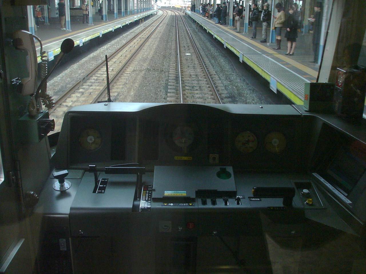 東京地下鉄東西線07系運転台